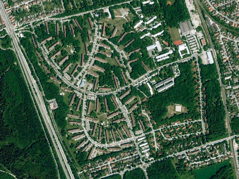 Luftaufnahme der Bayerischen Vermessungsverwaltung: Siedlung Fasangarten in München, Bayern.